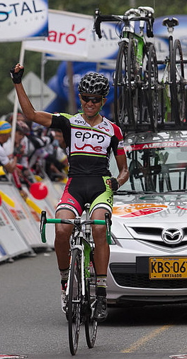 8ª Etapa Clásico RCN 2013 Viernes 4 de octubre de 2013 Cartago - Cali (209Km) Foto: ©